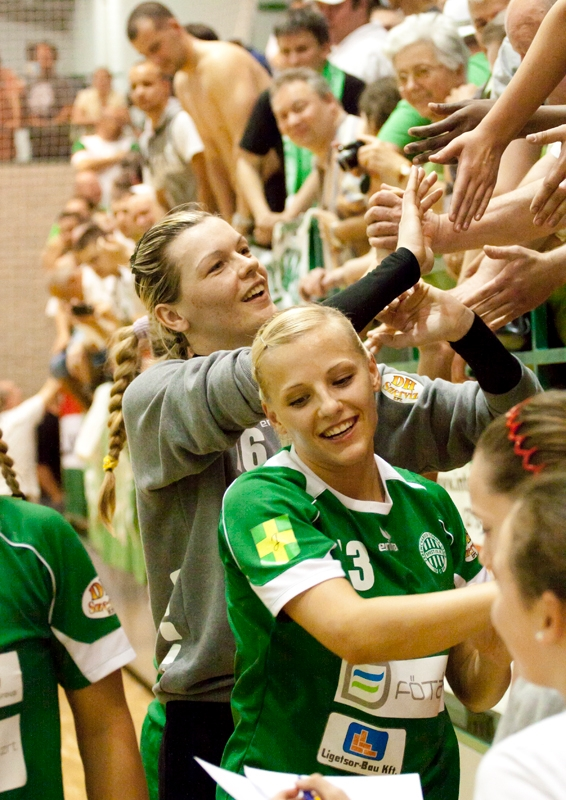 Alena Abramovics (balra) és Szádvári Krisztina (jobbra) kézilabdázók.